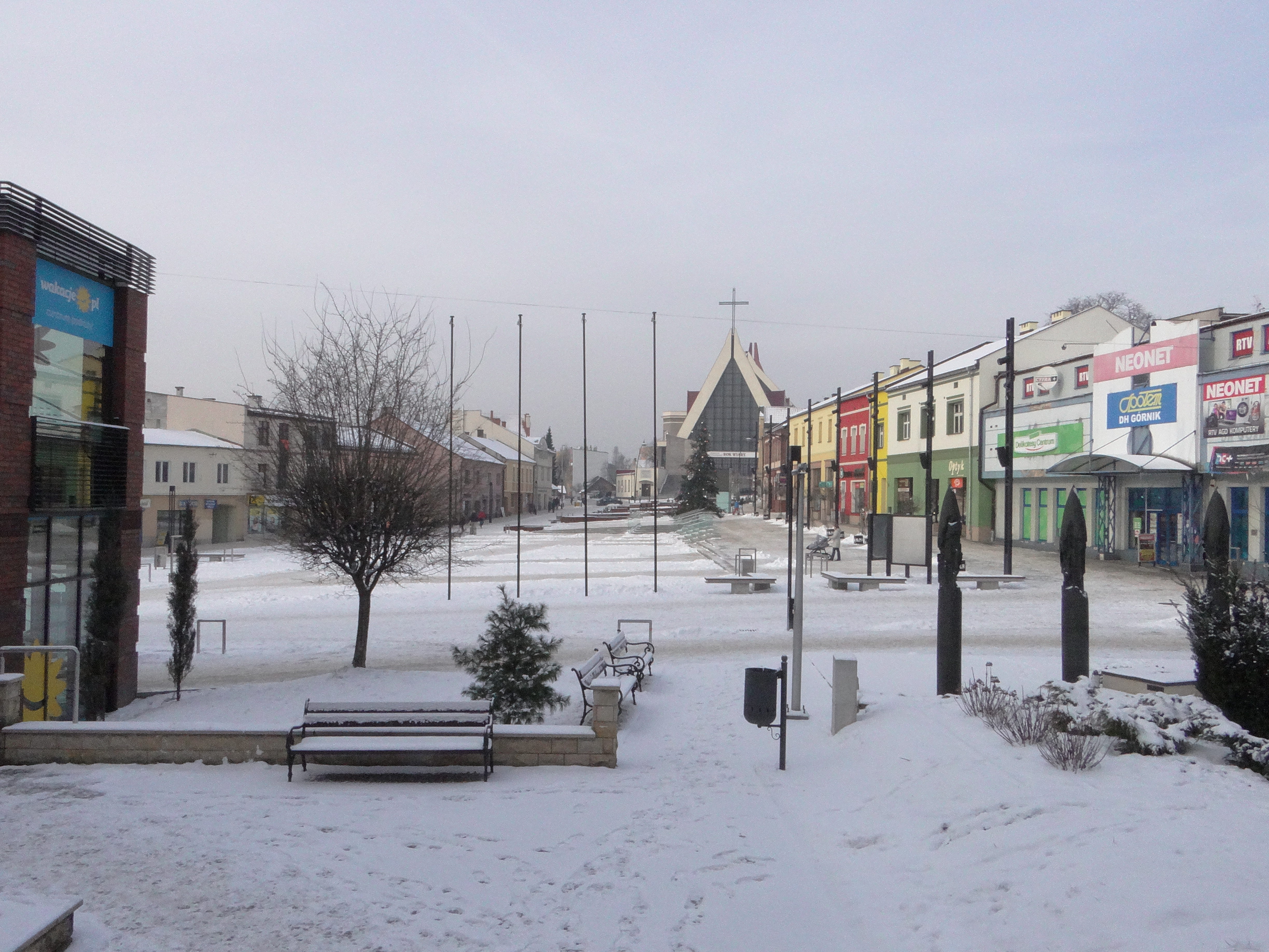 Zdjęcia nowego rynku - zima